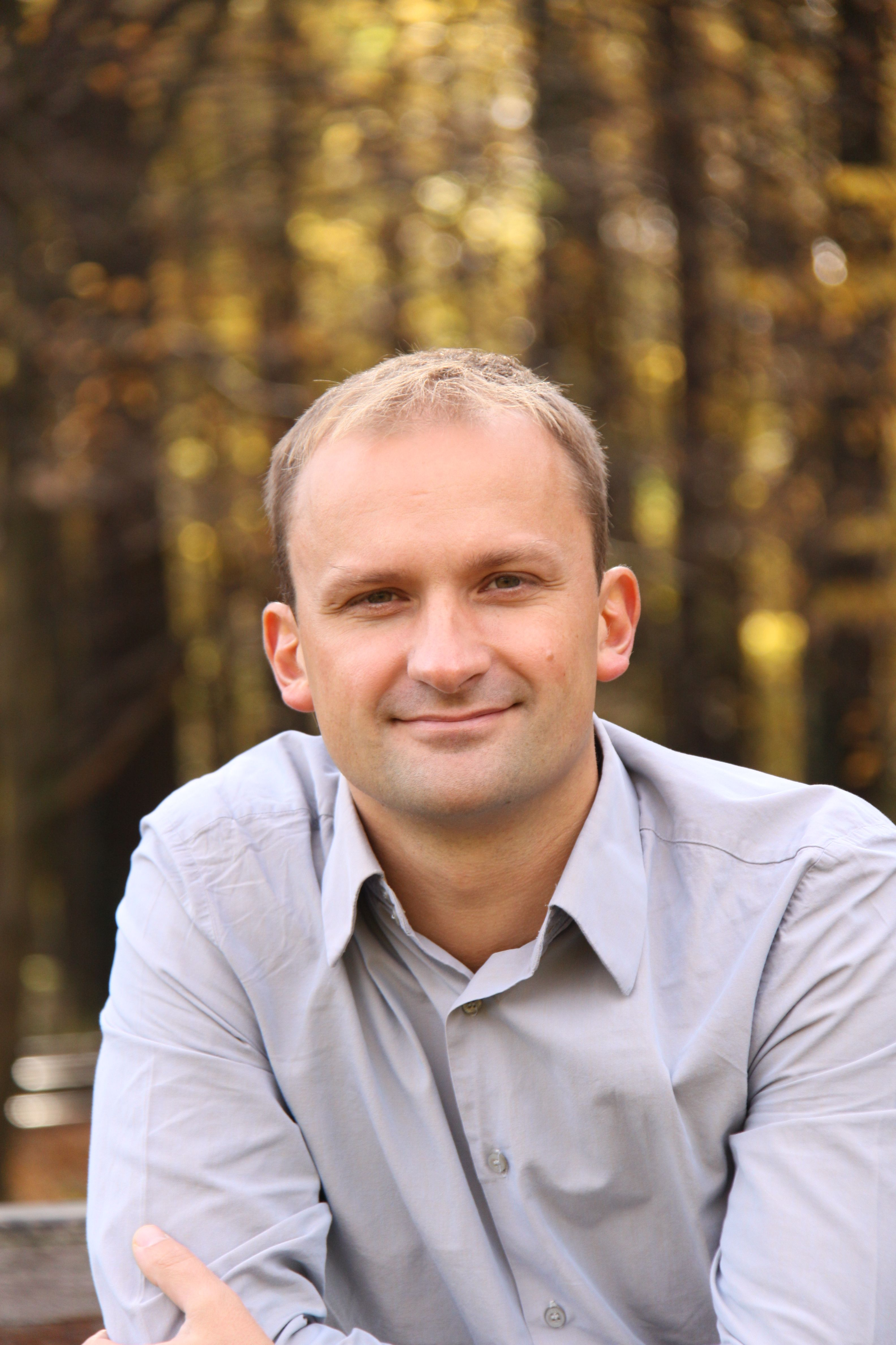 Hrvatski klarinetist i pedagog